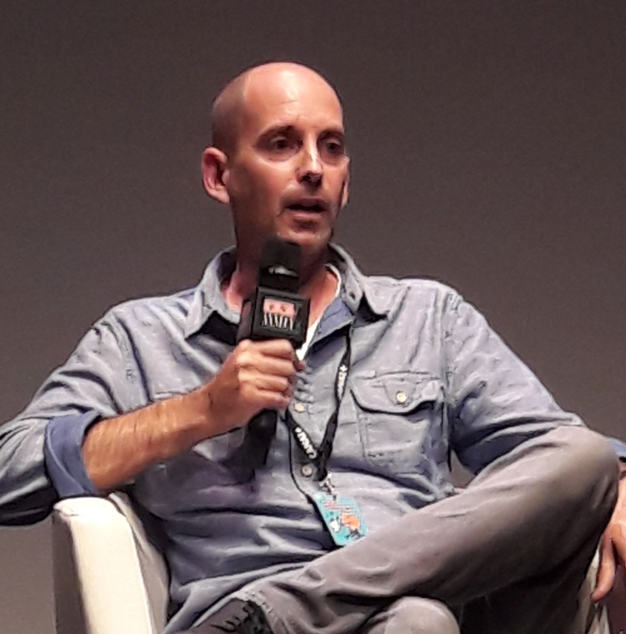 David Soren au festival international du film d'animation d'Annecy 2017